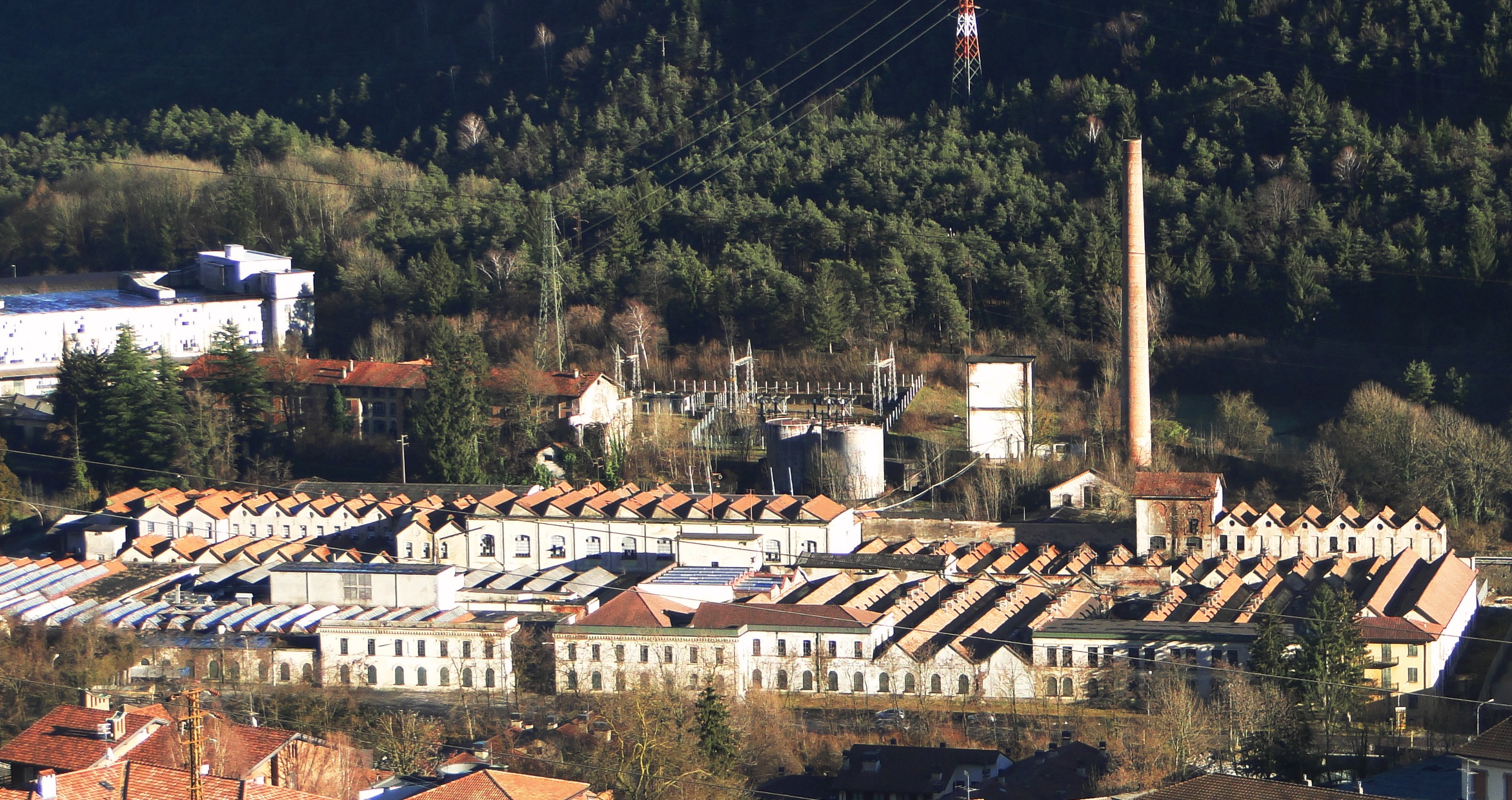 Zona industriale Cantoni, Ponte Nossa (BG)